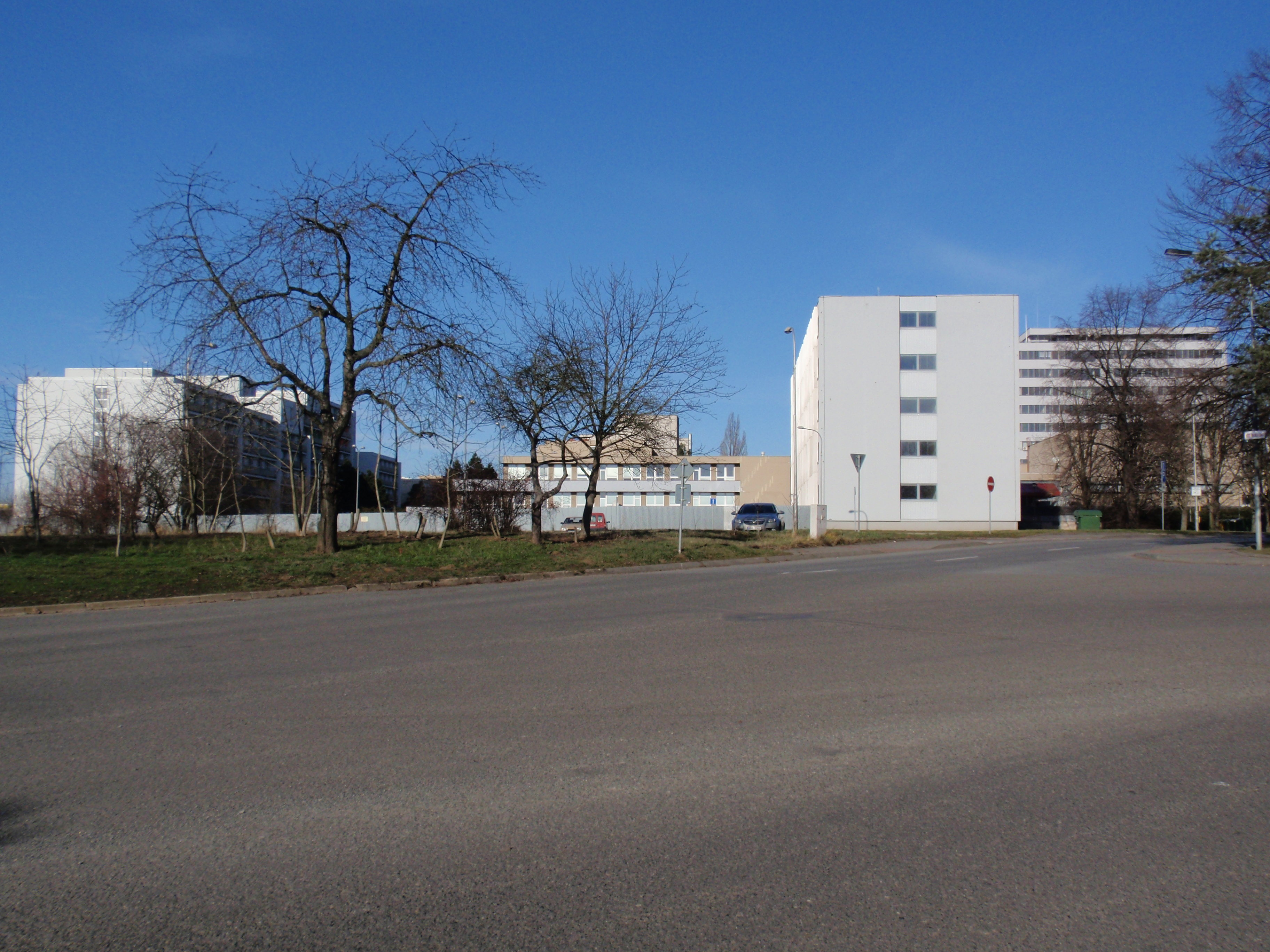 Dědice, areál vojenských škol v Dědicích, Kasárna Dědice, křižovatka